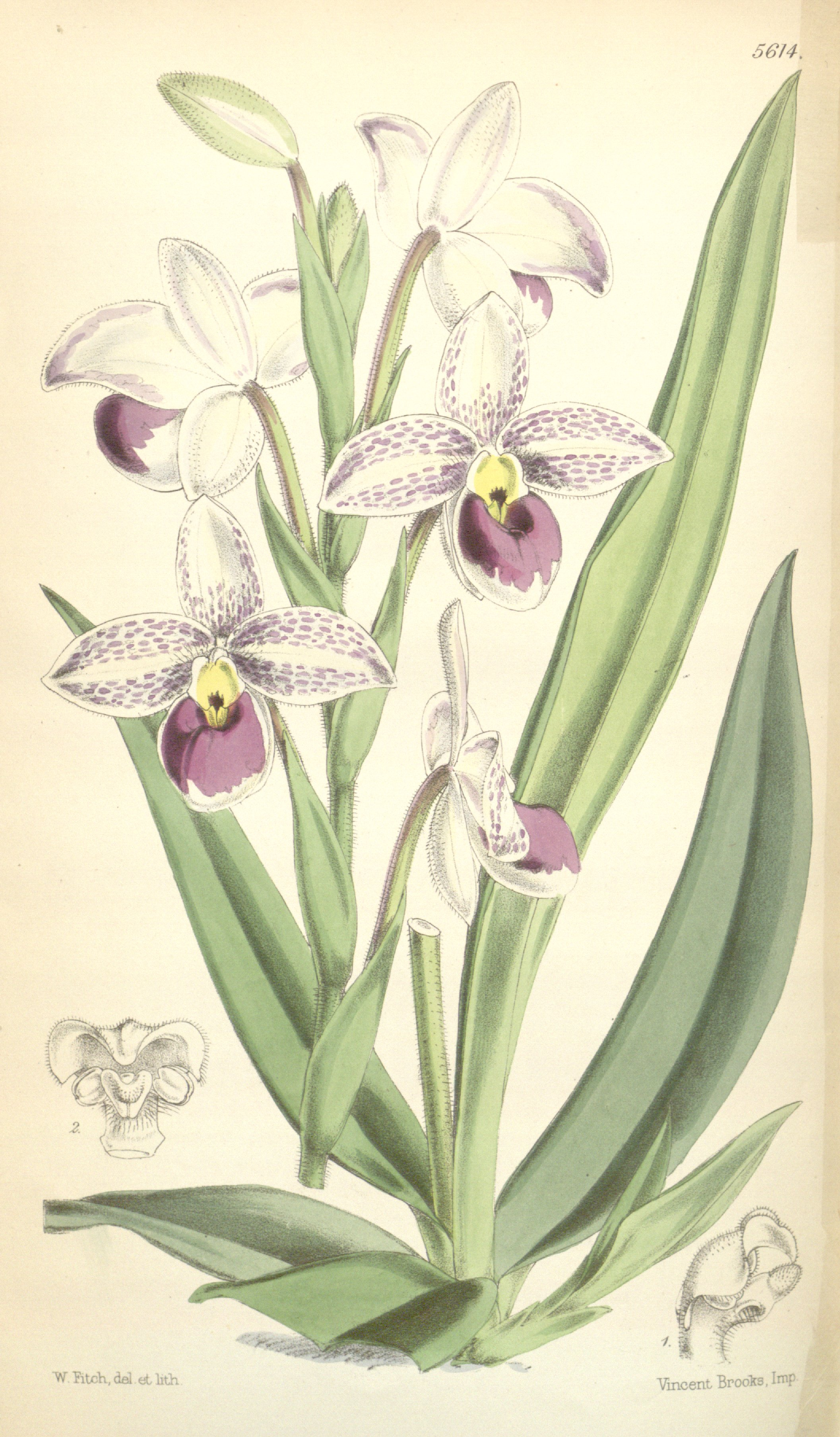 Illustration of Phragmipedium schlimii (as syn. Cypripedium schlimii)